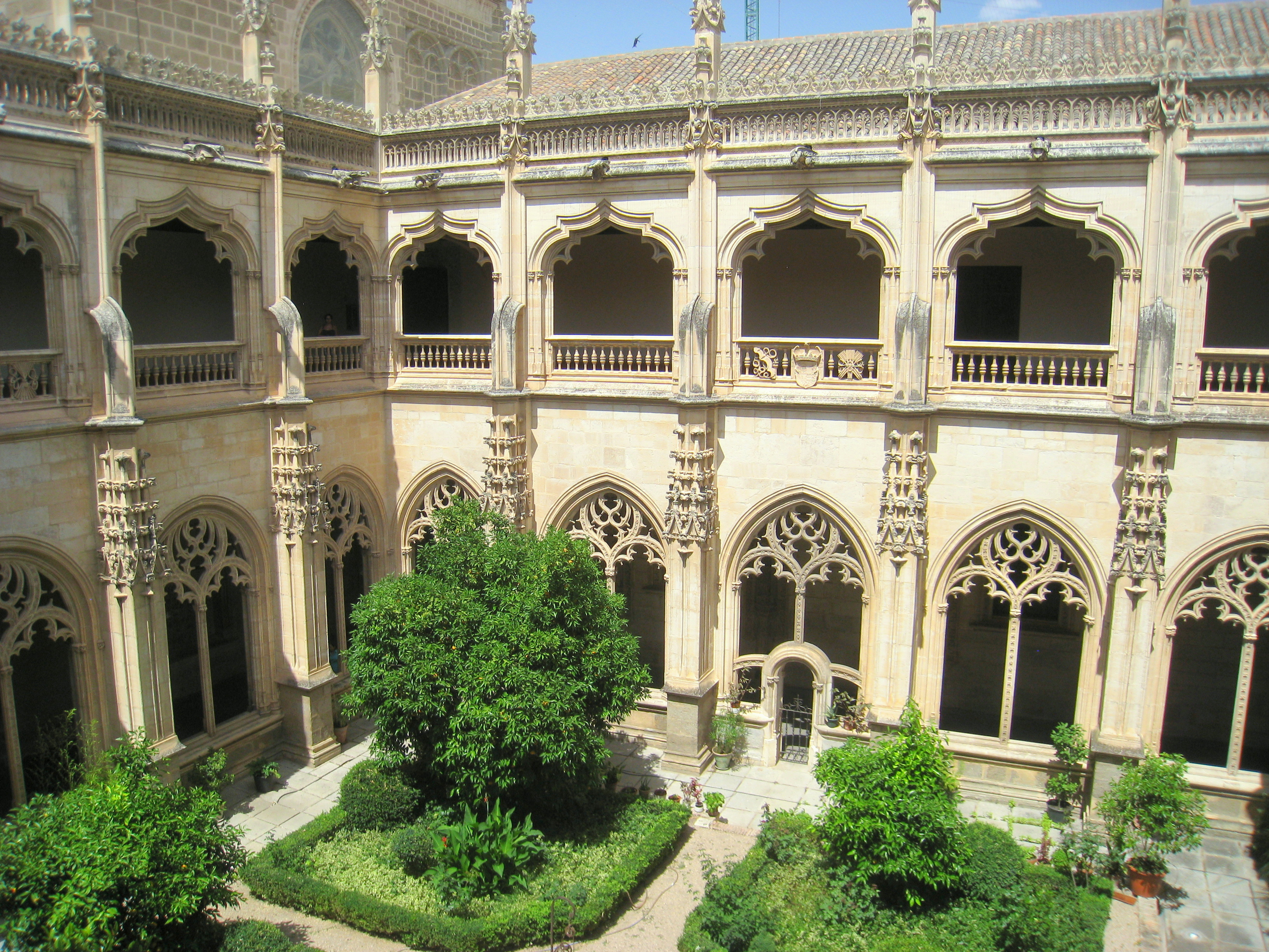 San Juan de los Reyes - Toledo, Spain.